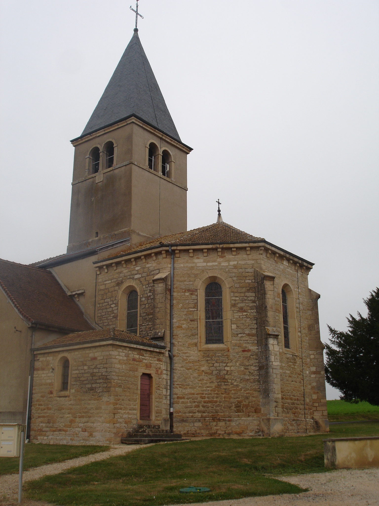 Vue de l'église du village de Chavannes-sur-Reyssouze